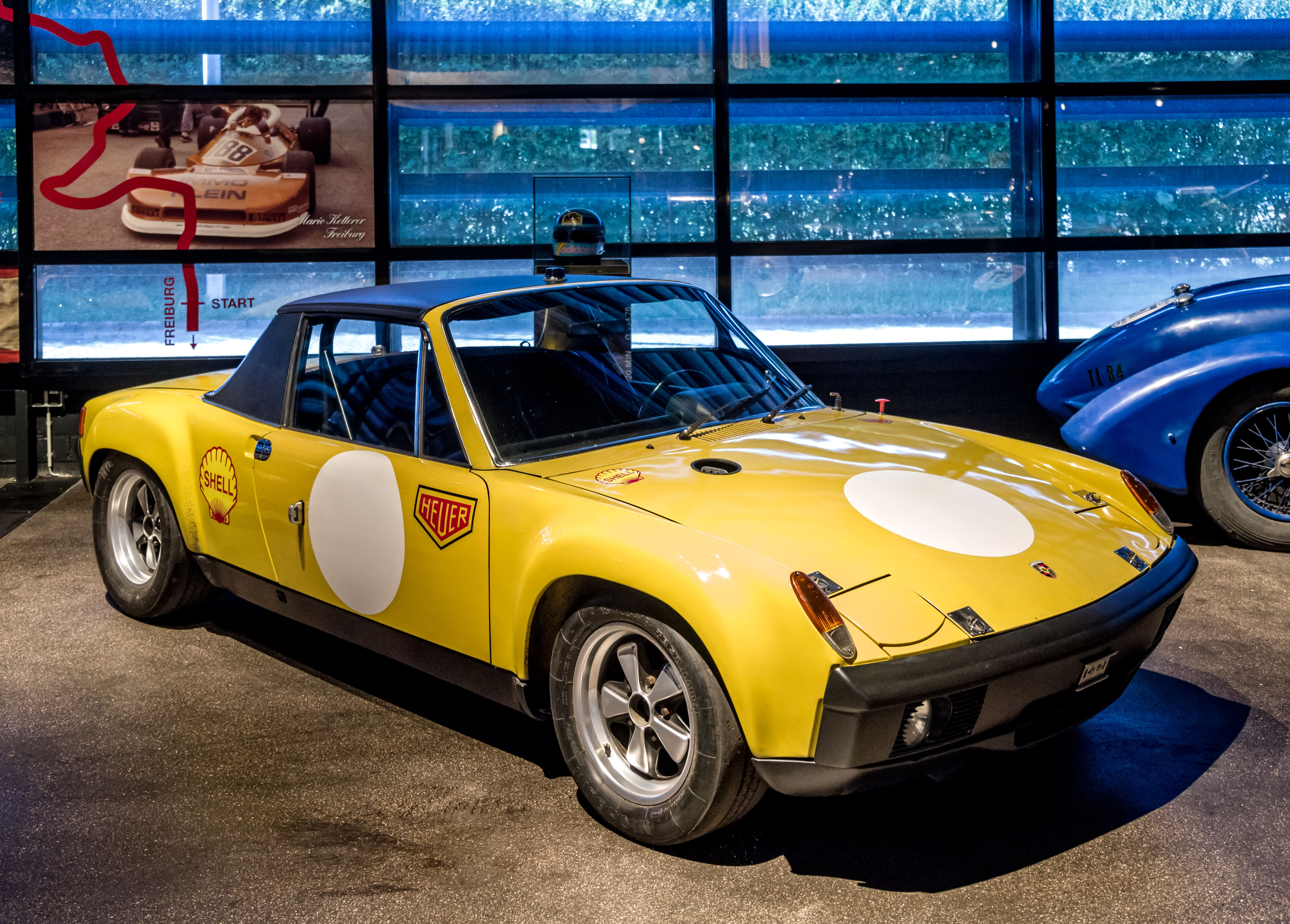 Das Volante Oldtimermuseum in Kirchzarten